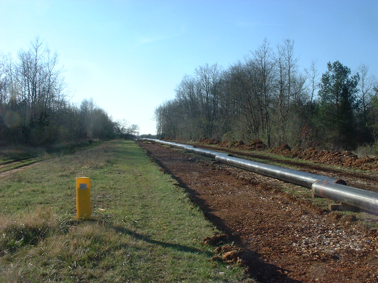 Chantier de gazoduc en cours de doublement à Chazelles (Charente, France), le 5 avril 2008. // Gas pipeline being doubled in Chazelles (France), 2008, april the 5th.